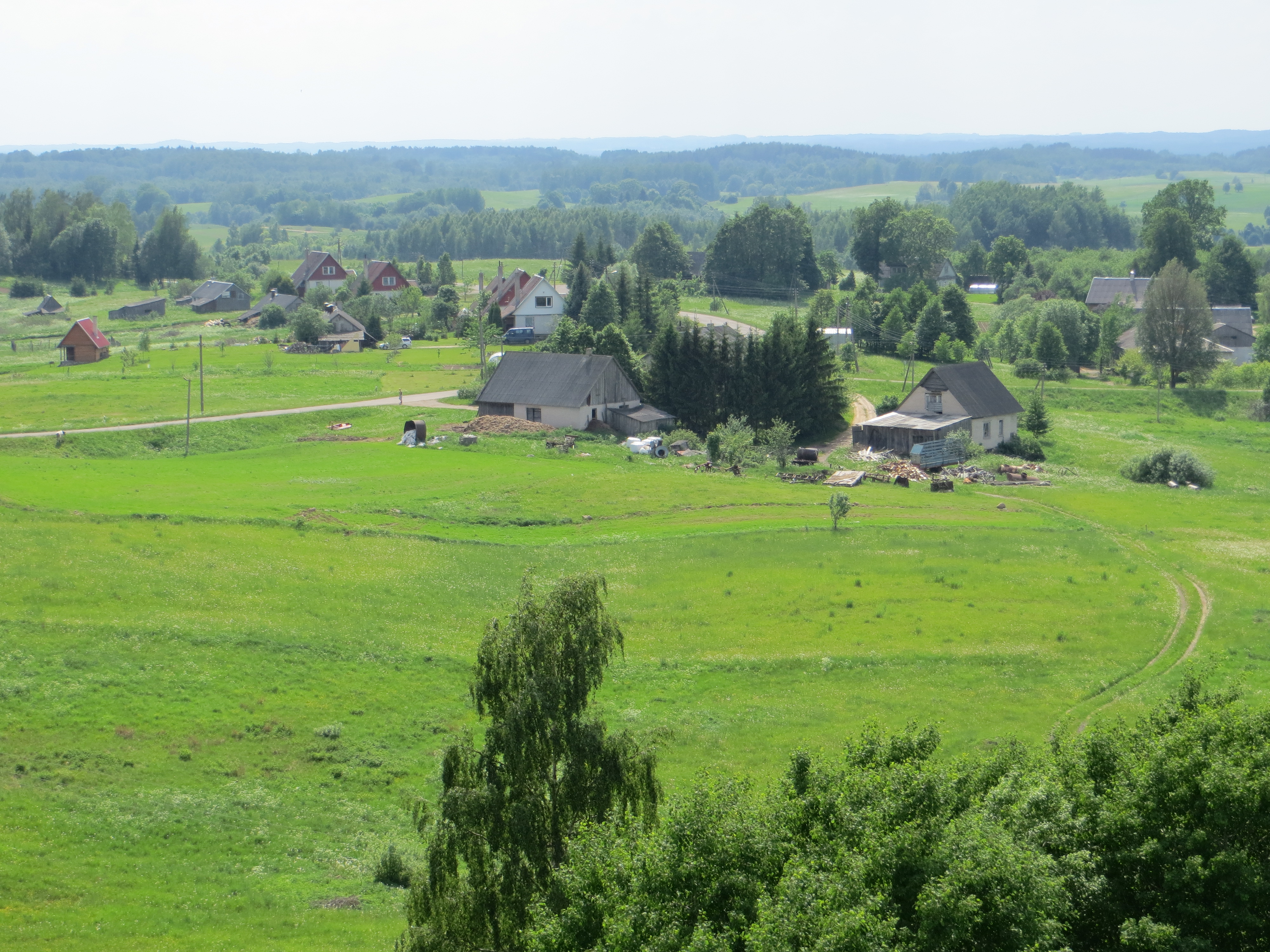 Dusetų sen., Lithuania